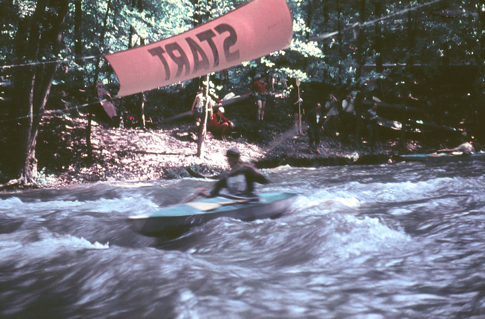 Kanufahrer am Startbereich der Weltmeisterschaften im Wildwasserrennen und Kanuslalom 1961 in Hainsberg.